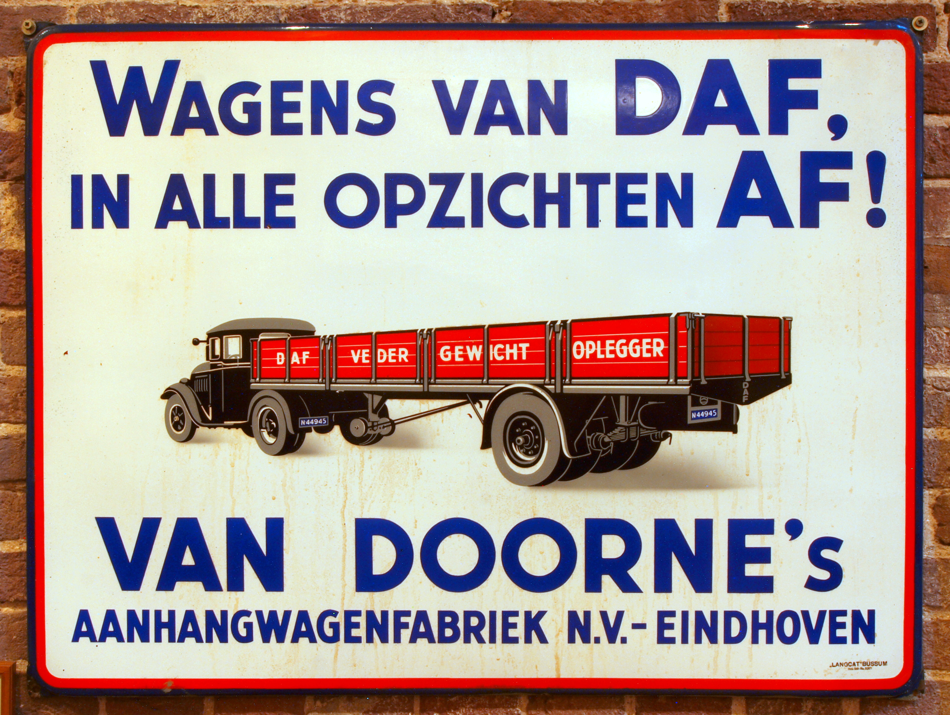 DAF museum